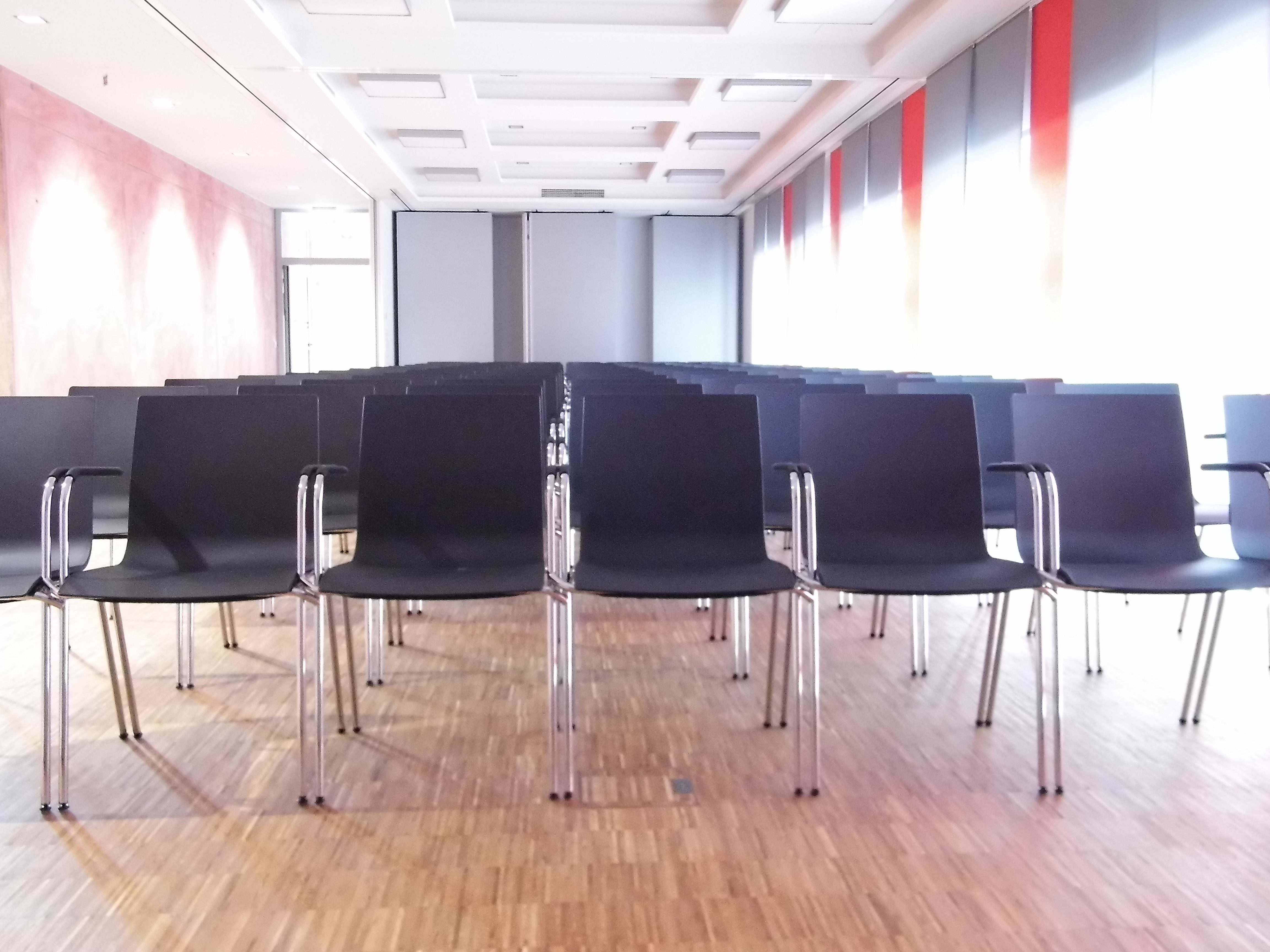 Blick in den Vortragsraum der Stiftung Demokratie Saarland Architektur & Interior Design: Wolfgang Rost, Dipl.-Ing.